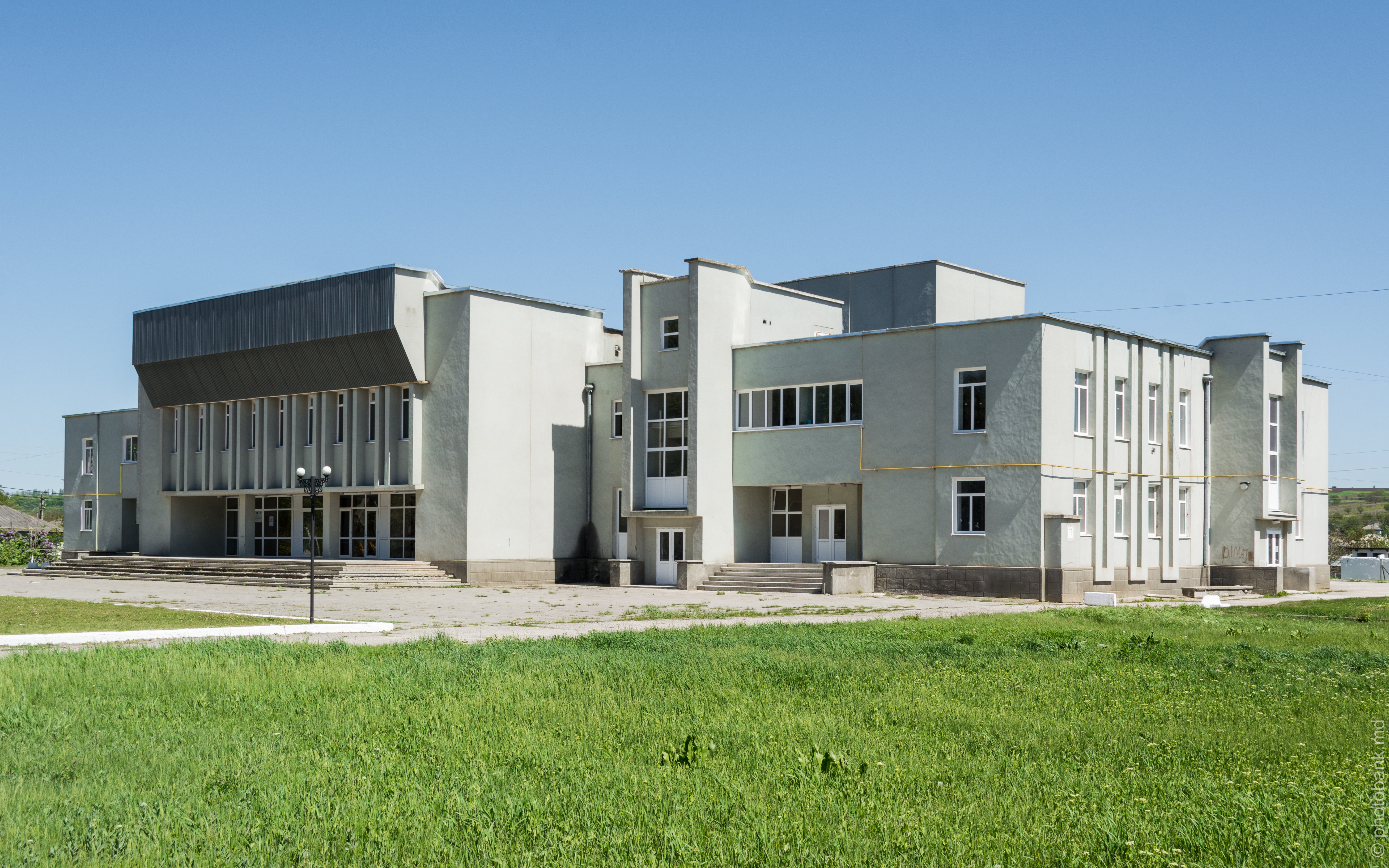 Дом культуры в Корлатенах (Рышканский район) / Casa de cultura Corlateni (raionul Riscani)